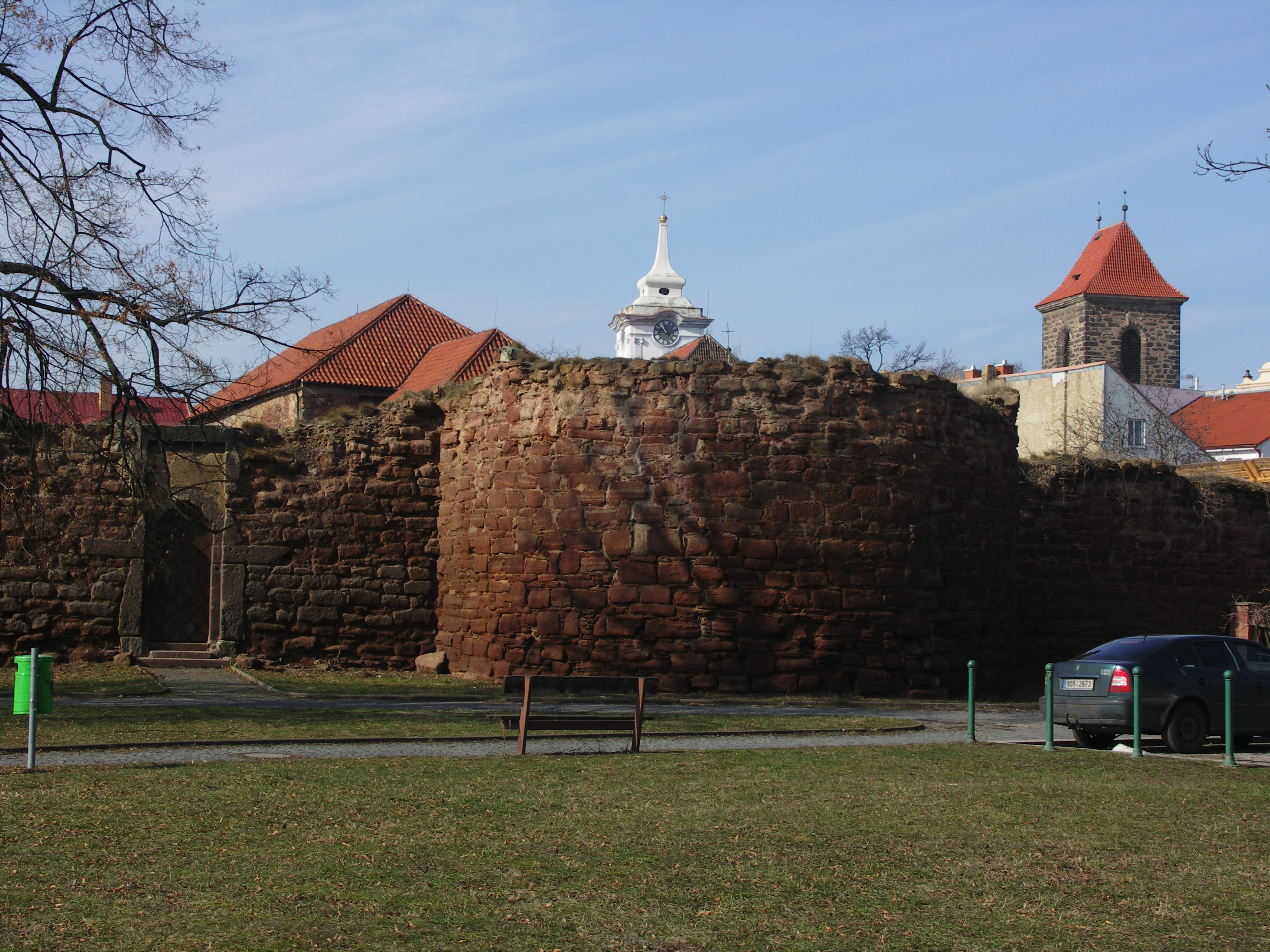 Městské opevnění (Český Brod), Český Brod